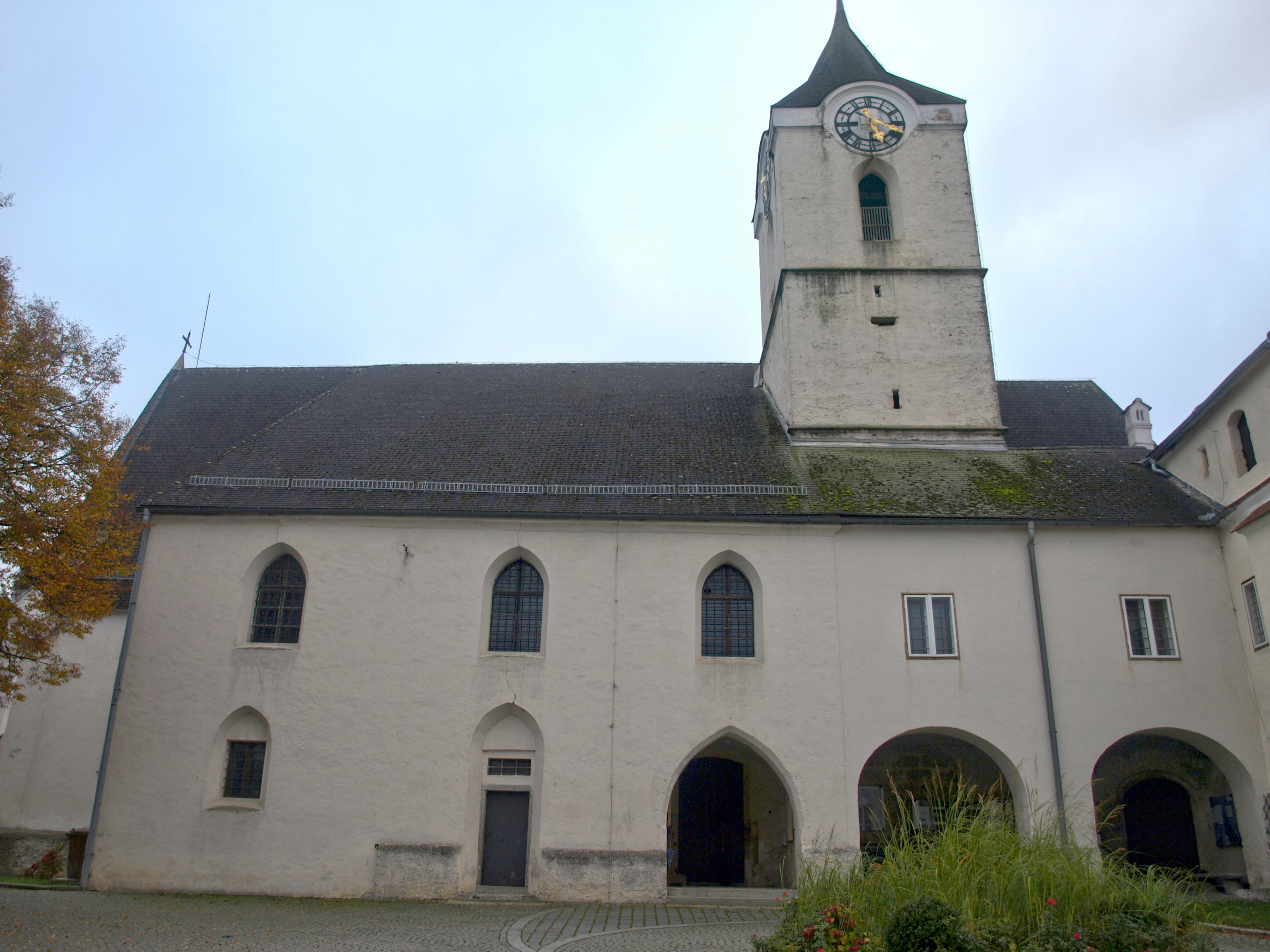 Kath. Pfarrkirche hll. Peter und Paul, ehem. Stiftskirche